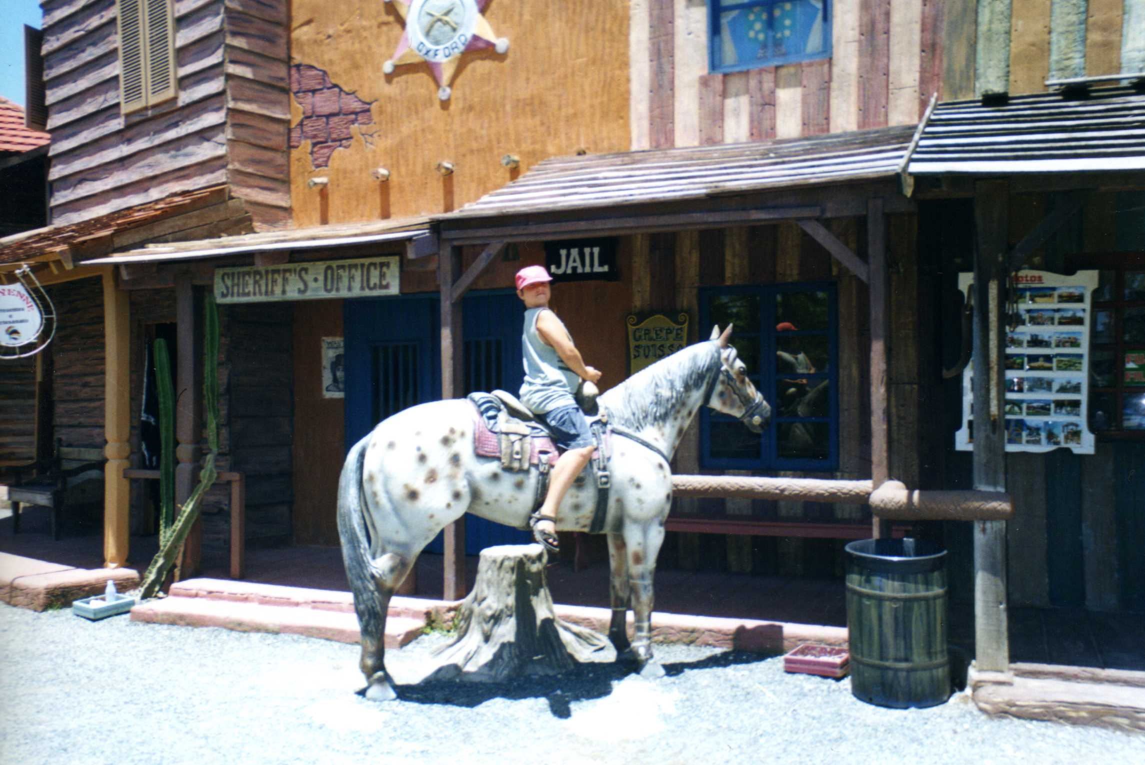 Área temática Viejo Oeste, dentro del Beto Carrero World en Brasil.